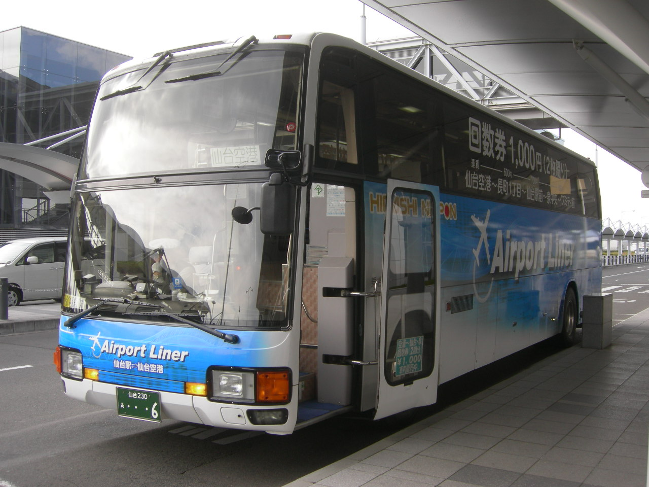 東日本急行「エアポートライナー」（Higashinippon Express Airport Liner） 三菱ふそう・エアロクィーンMV